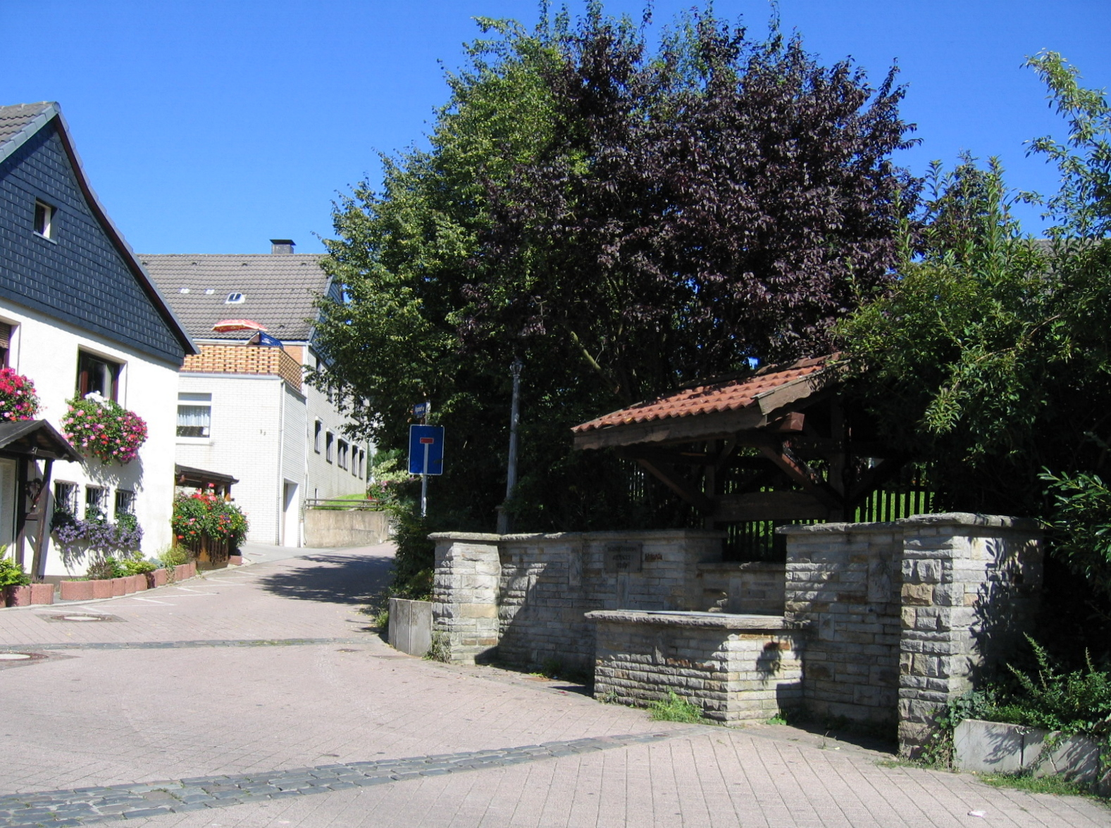 Dorfbrunnen in Hemer-Apricke.